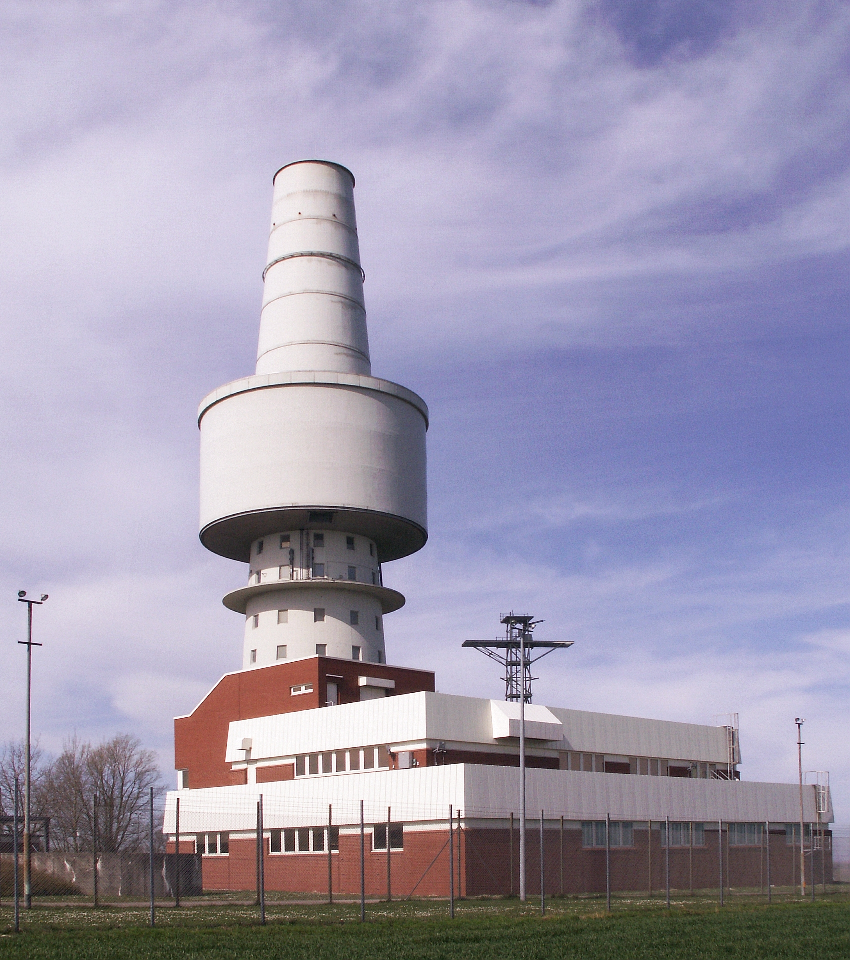 Klaustorf in Holstein Fernmeldesektorturm A - Turm A militärischer Aufklärungsturm nahe Großenbrode - Foto 2007 © Wolfgang Pehlemann PICT0476